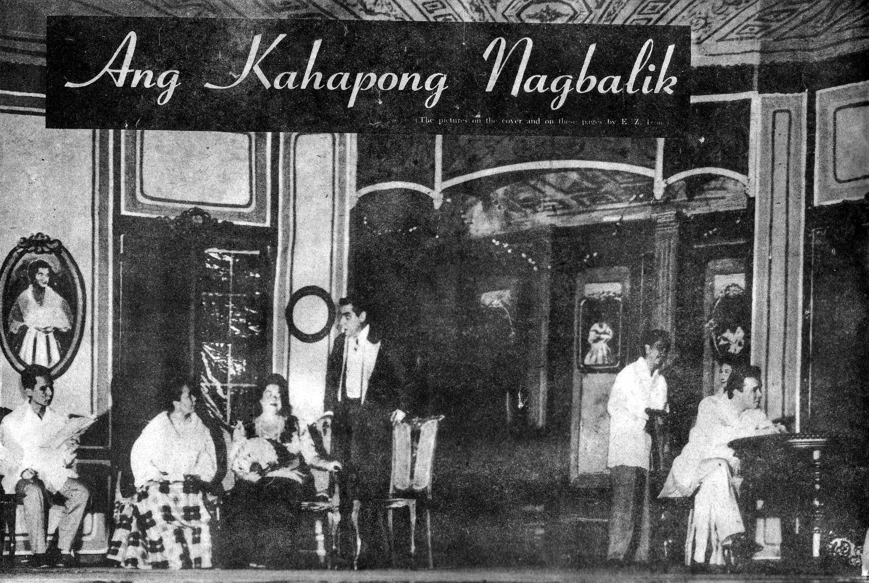 Dramatic Philippines presentation of Ang Kahapong Nagbalik, Tagalog translation of Francisco Alonso Liongson's Spanish original, El Pasado Que Vuelve.